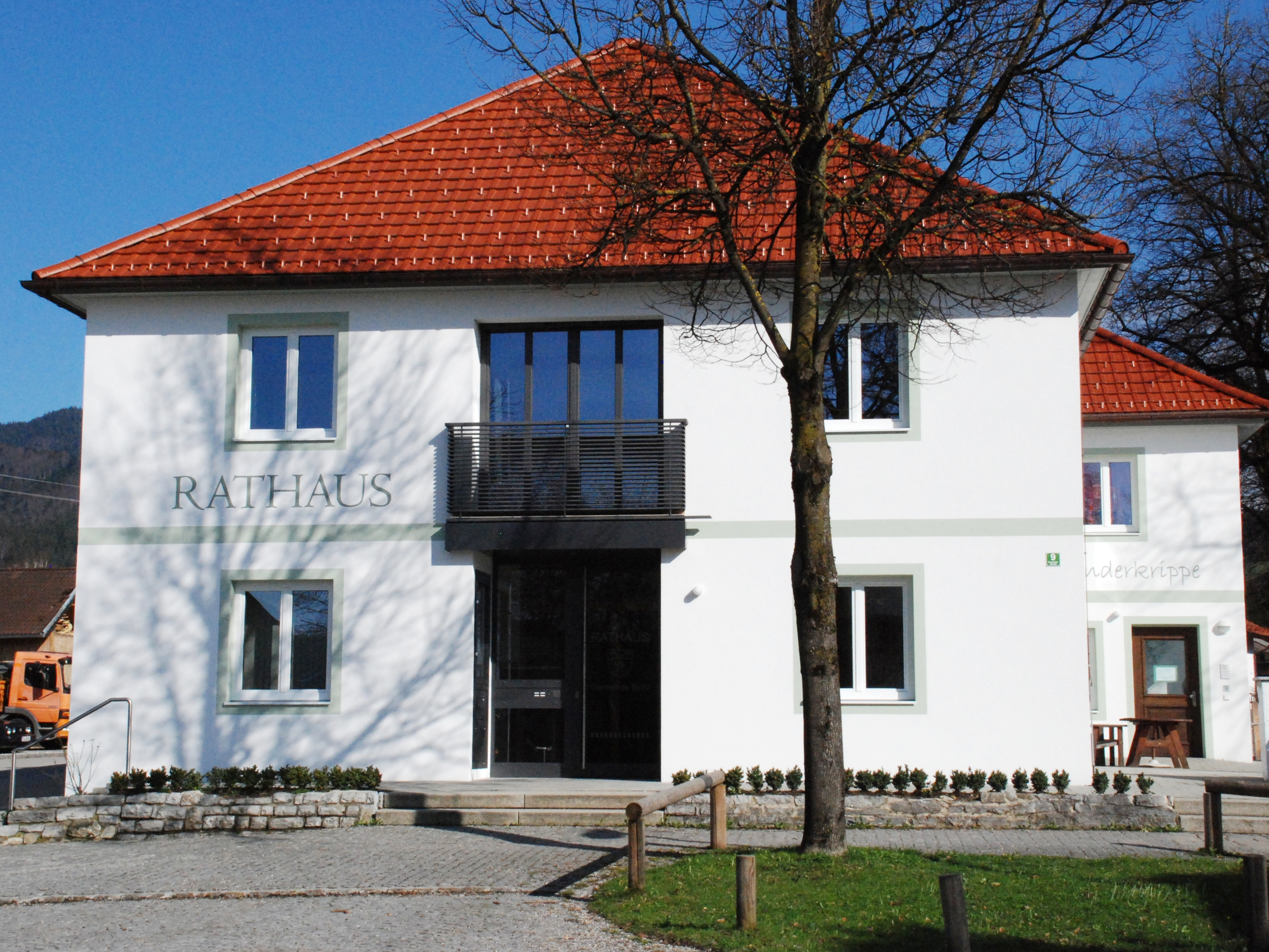 Rathaus von Bichl, Landkreis Bad Tölz-Wolfratshausen, Regierungsbezirk Oberbayern, Bayern.